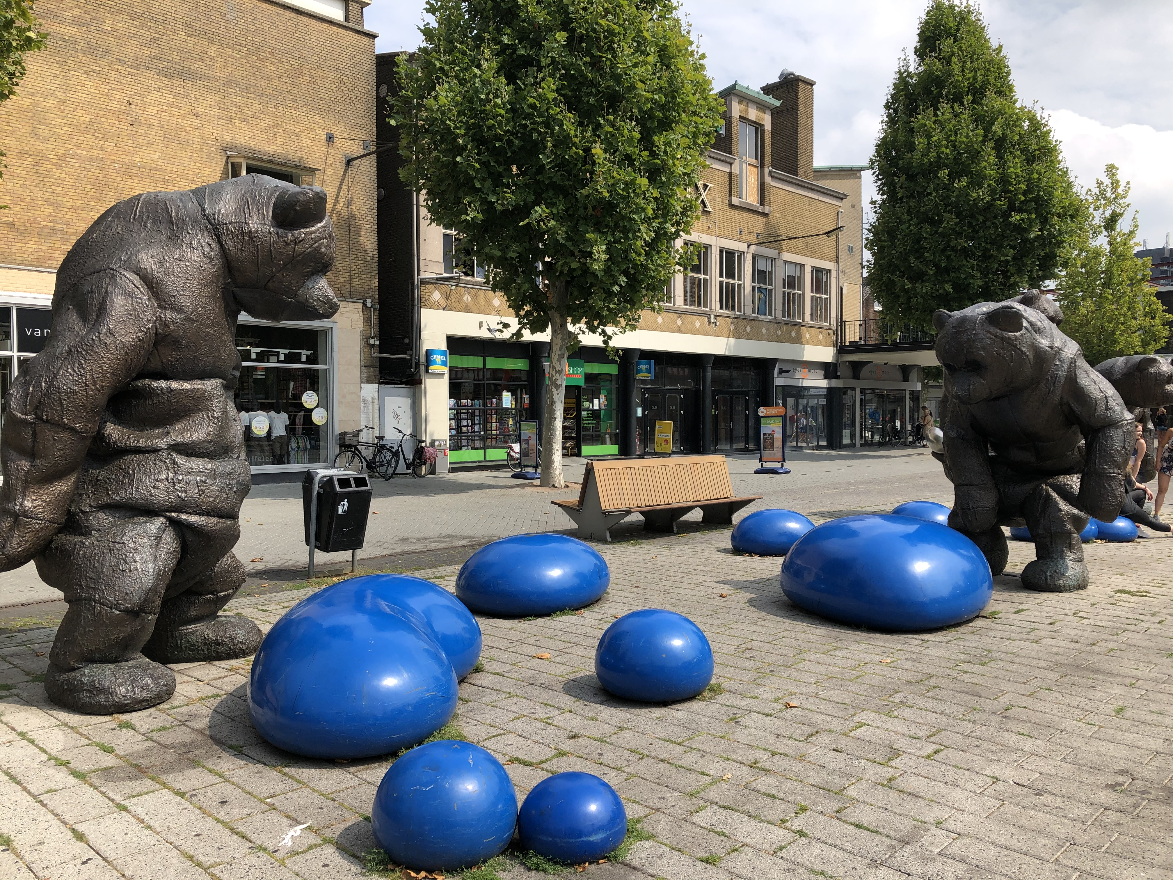 Badgasten door Marjolijn Mandersloot, Hengelo 2012